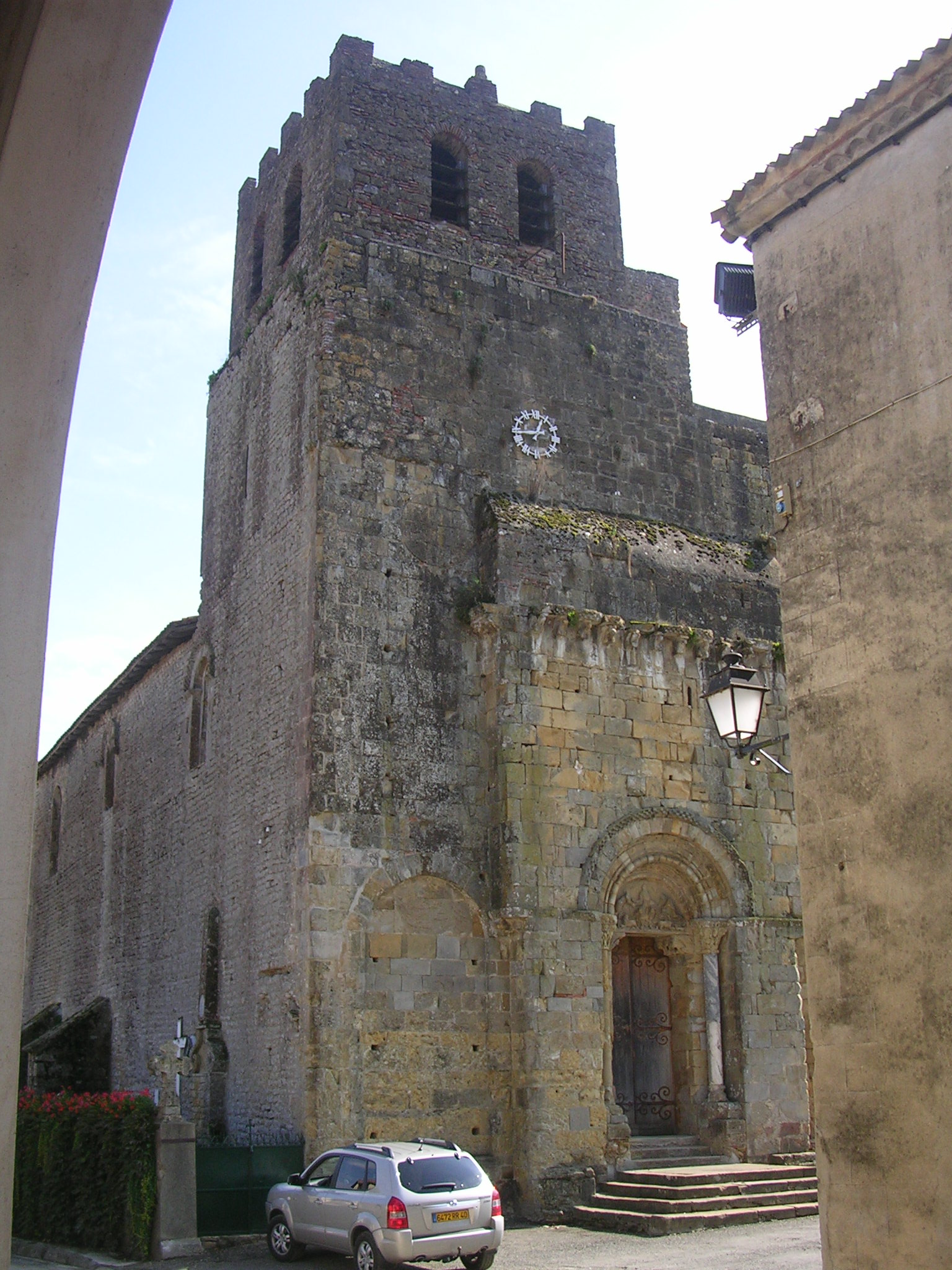 Façade de l'église de Tasque (Gers, France)